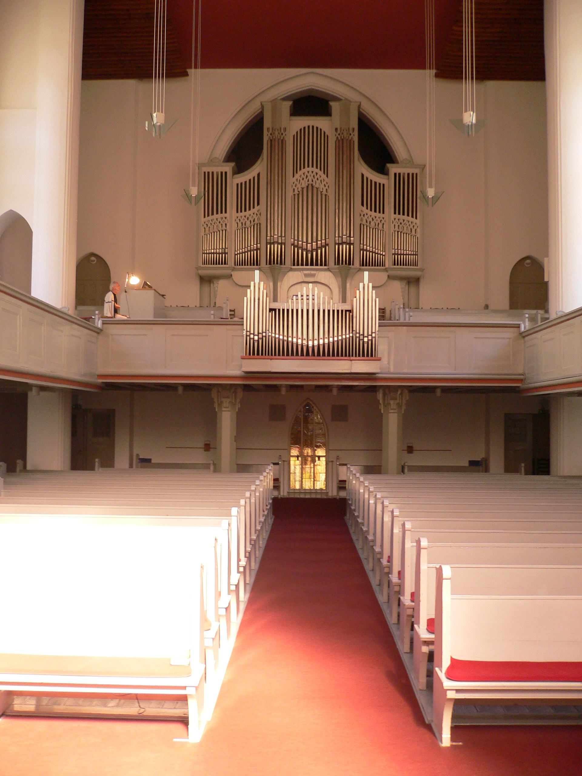 Kirchenschiff der lutherischen Kirche Zum Heiligen Kreuz